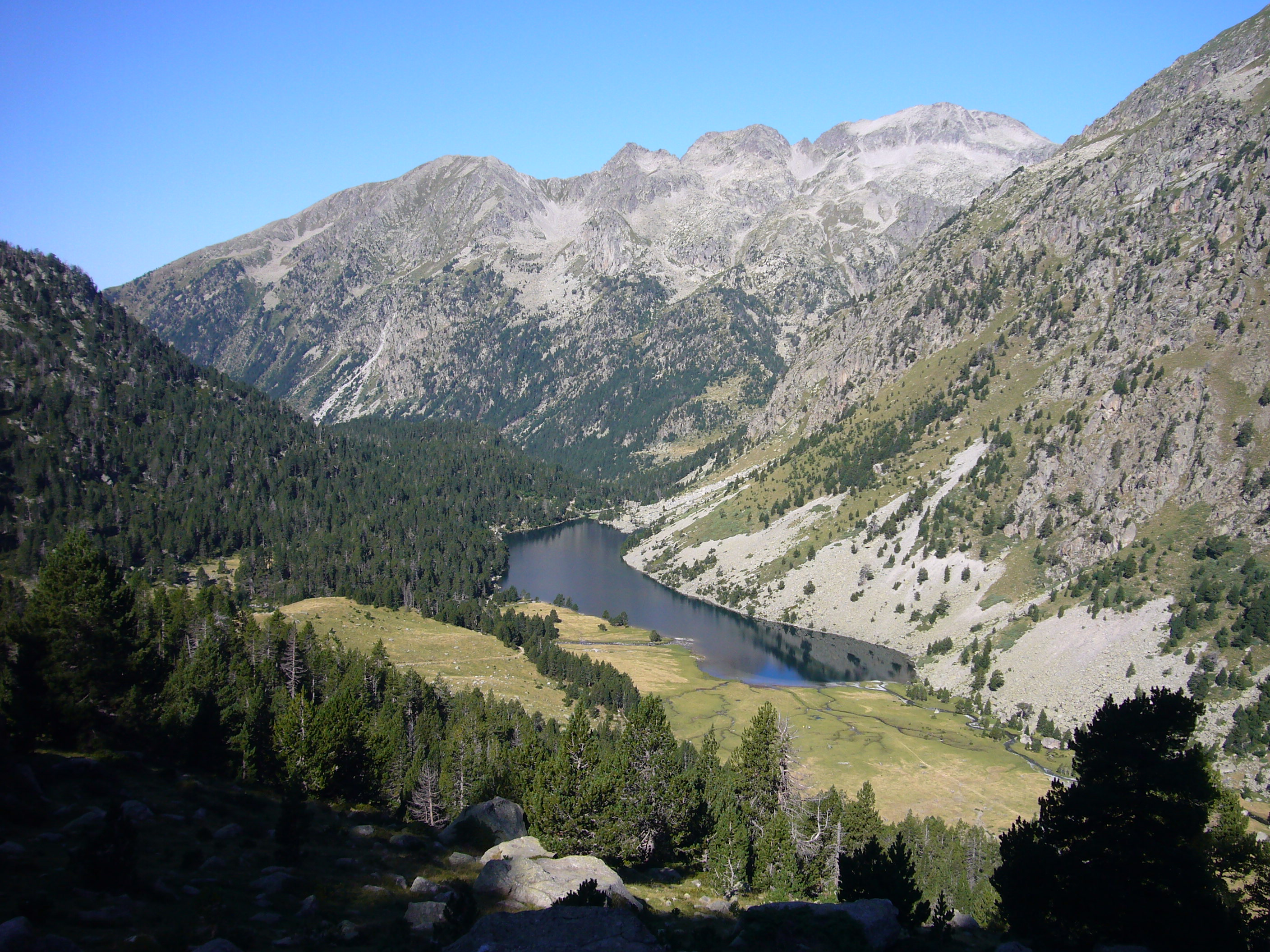 Estany Llong i carena oriental de la Vall de Sarradé, vistos des del camí del Portarró d’Espot; la Vall de Sarradé; la Vall de Boí, Alta Ribagorça, Catalunya.